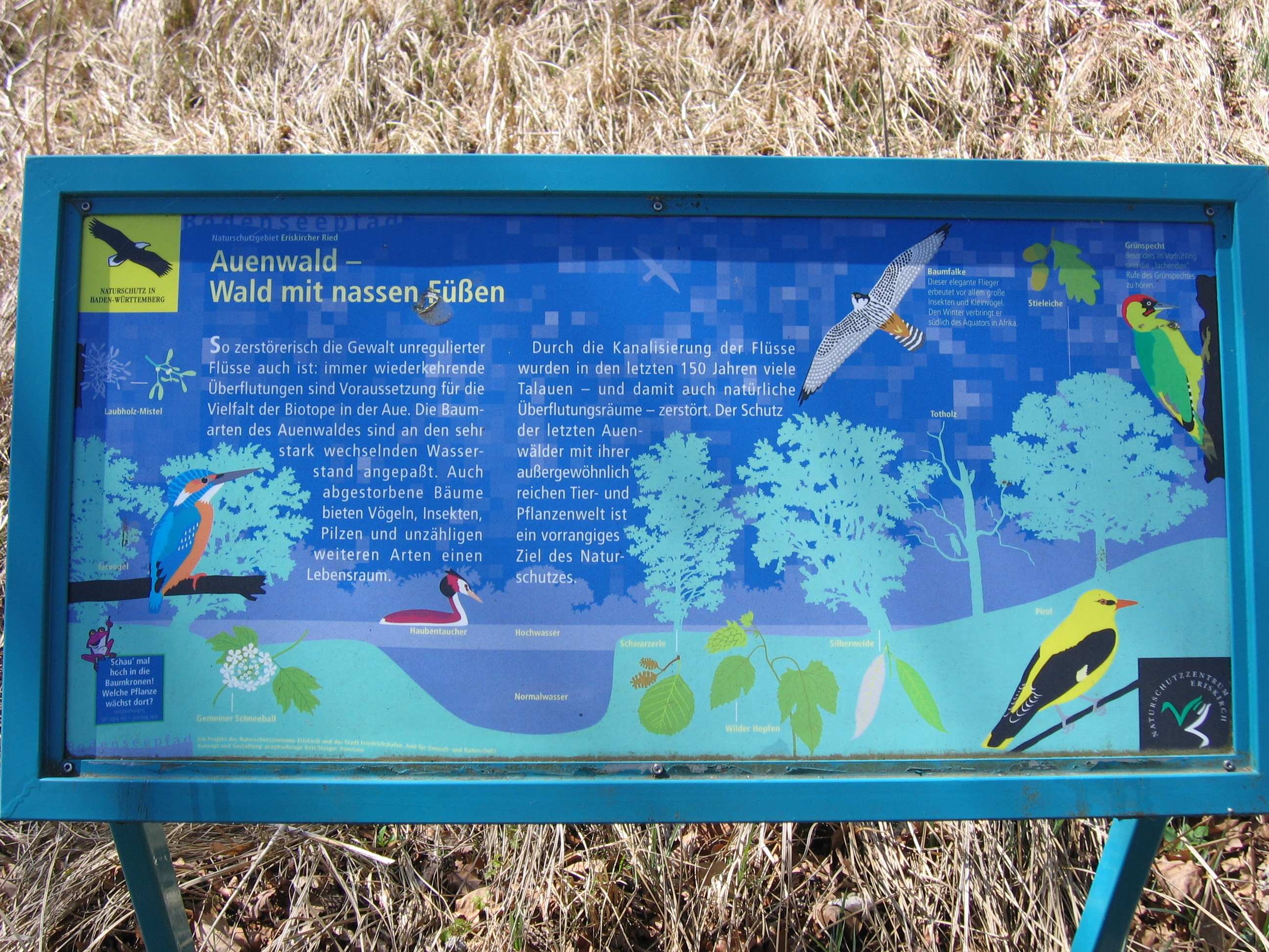 Bodenseepfad/Eriskircher Ried: Infotafel "Auenwald"